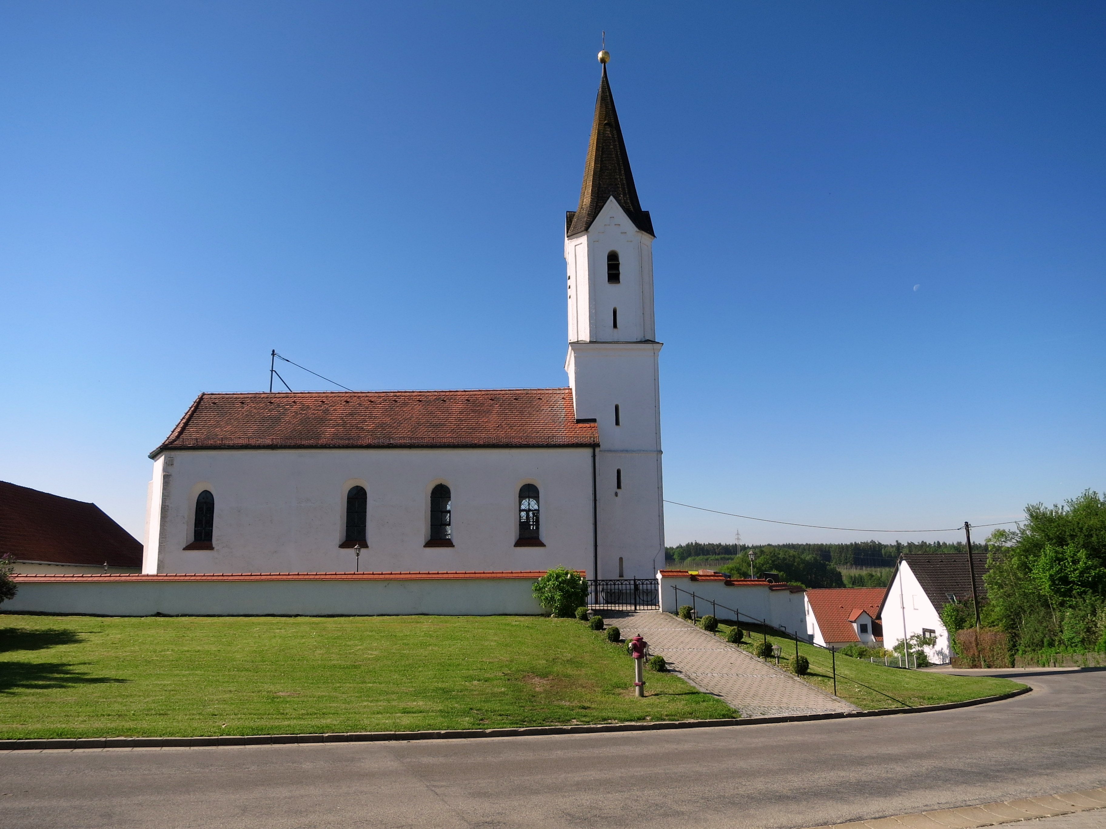 Eine Filialkirche mit romanisch-gotischem Saalbau